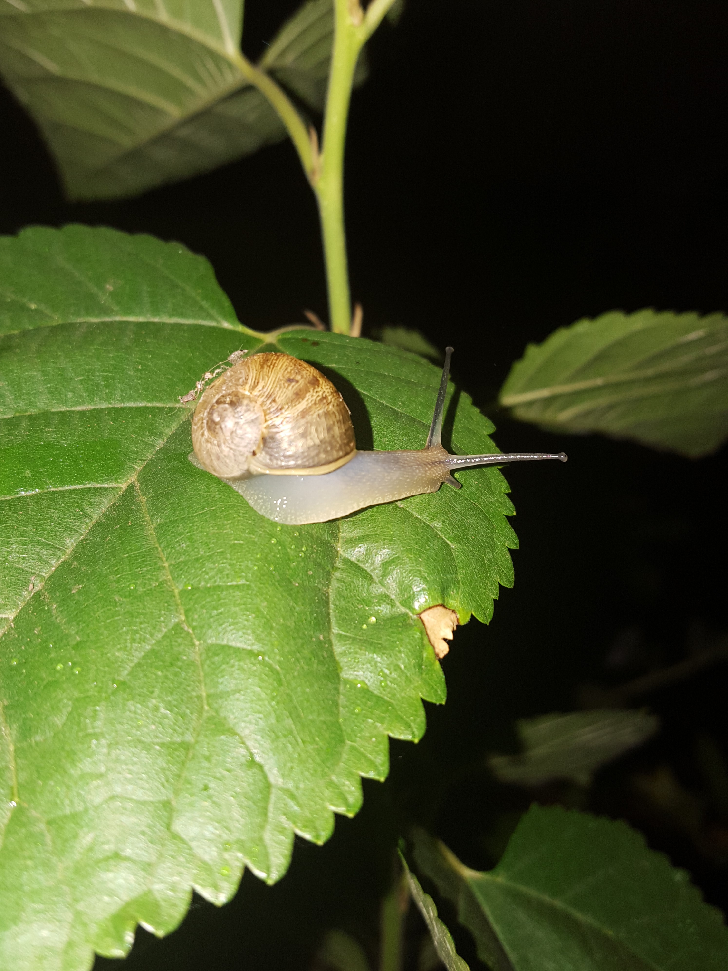 Snail on a white mulberry leaf